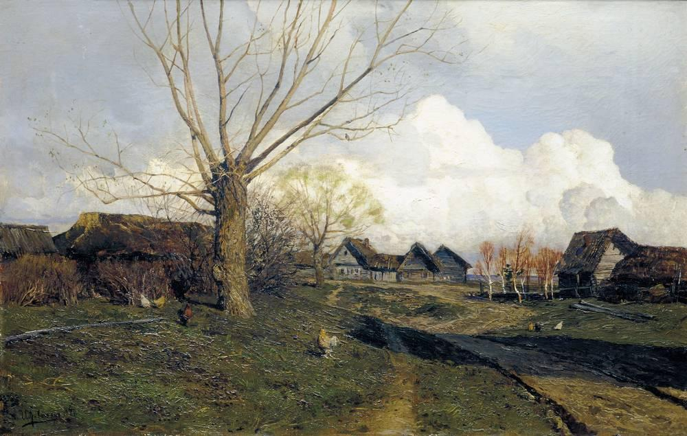 Savvinskaya sloboda near Zvenigorod. Pictury by Isaak Levitan Саввинская слобода под Звенигородом. Картина Исаака Левитана, 1884.